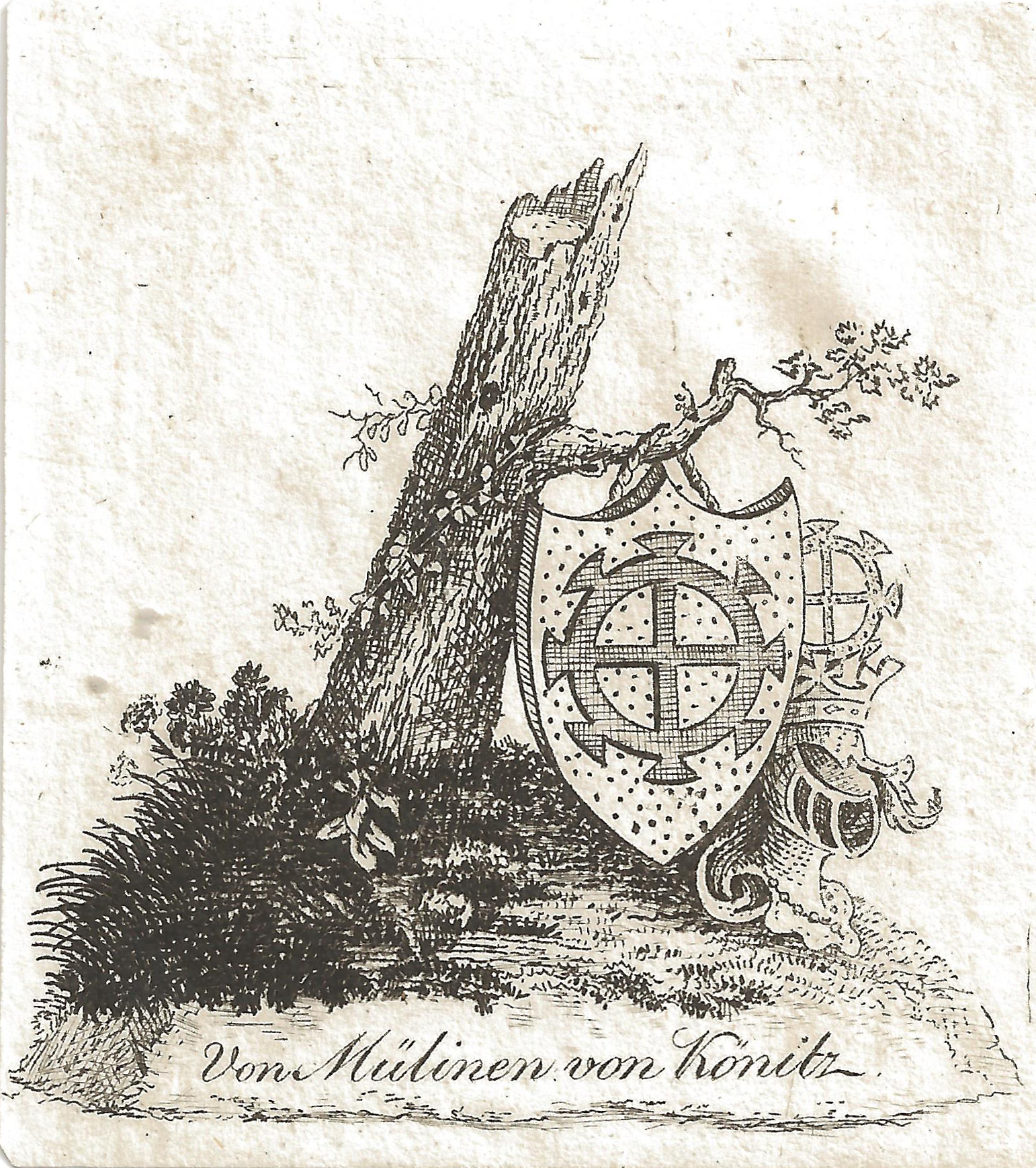 Exlibris Beat Emanuel von Mülinen (1707-1770).